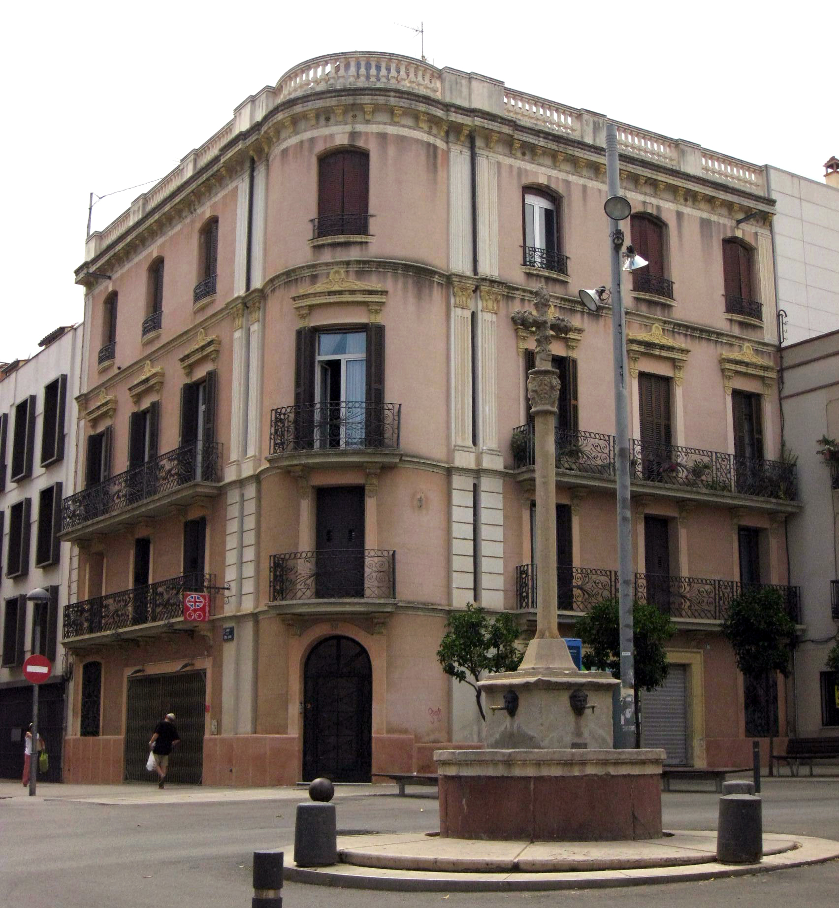 Habitatge a la placeta de la Creu Gran núm. 15 (Terrassa), edifici de final del segle XIX. En primer terme, la Creu Gran.